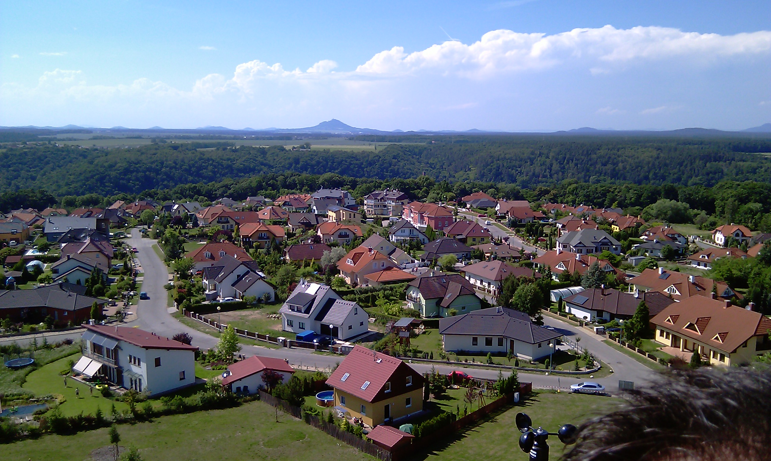 Pohled na obec Bradlec z jejího středu a výšky 30 m.